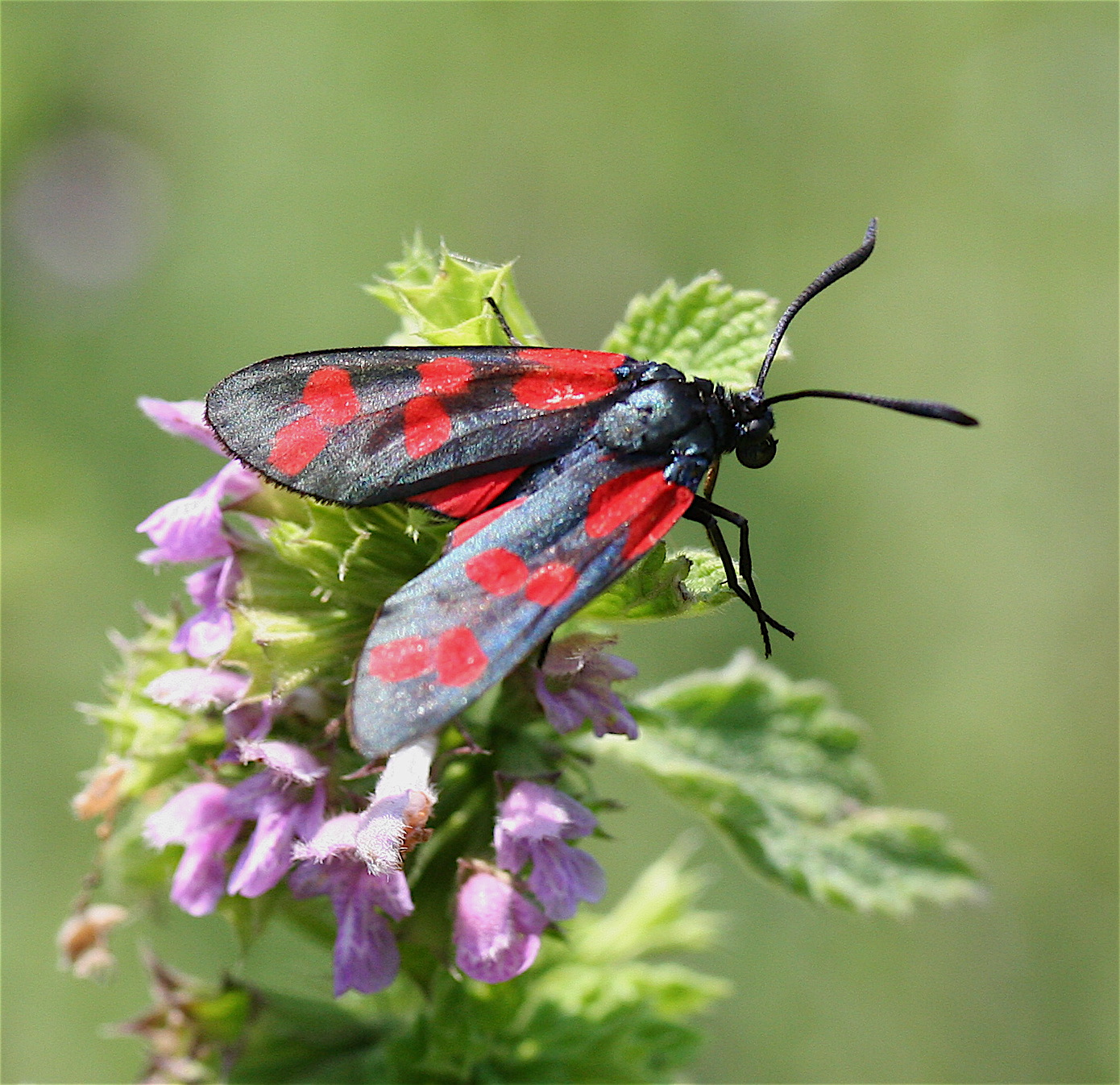 Lepidoptera - Zygaenidae - Zygaena filipendulae